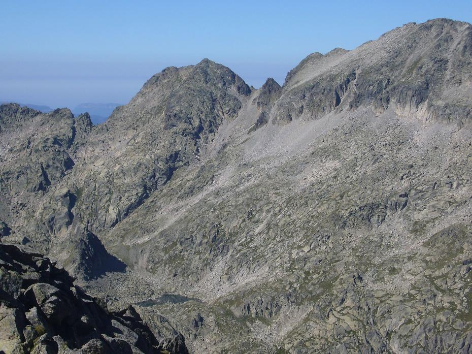 Pics del Racó i de Sarradé, i Estany de la Passada; vistos des de la collada situada al sud del Gran Tuc de Colomèrs; la Vall de Boí, Alta Ribagorça, Catalunya